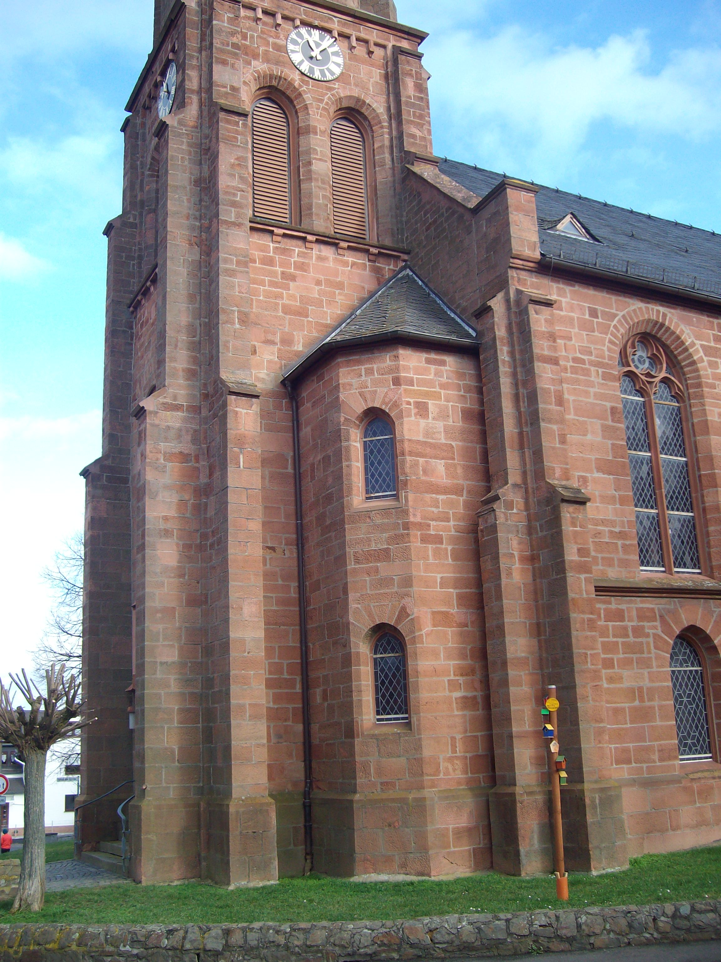 Evangelische Kirche Kinzenbach, Heuchelheim, Hessen, Deutschland